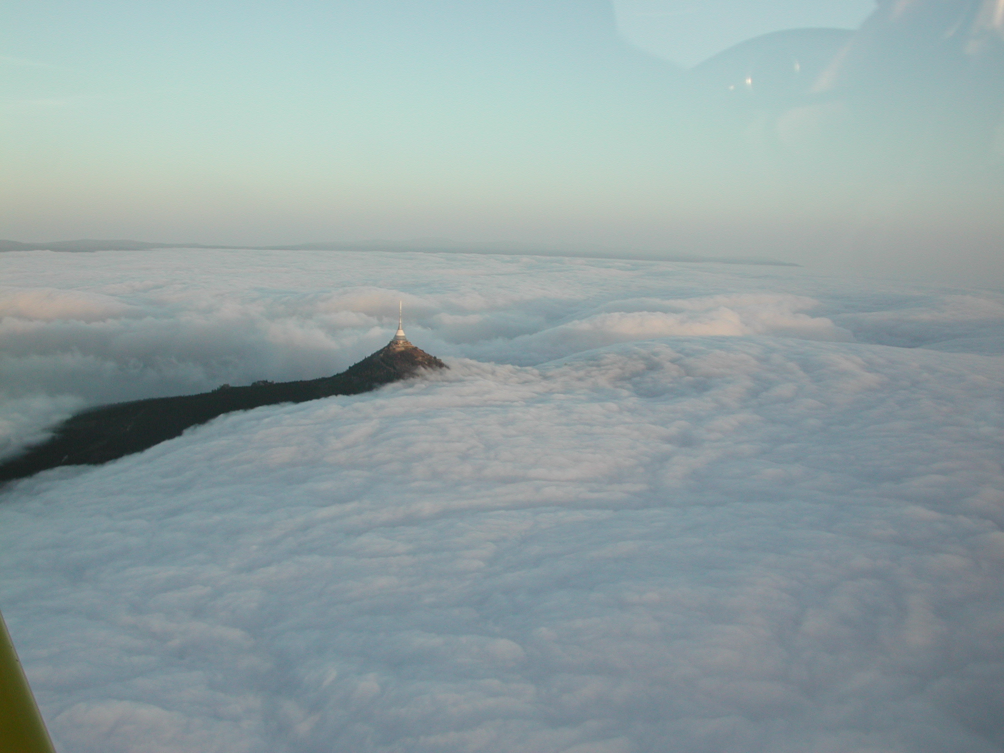 Inverze nad Libercem. Pohled ze soukromého letadla.